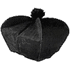 Biretta